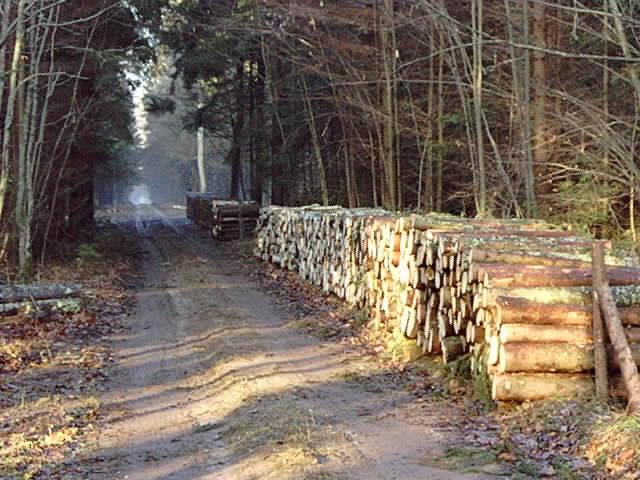 Białowieża Primaeval Forest, 300 m before wildlife reserve "Dębowy Grąd". Około 300 m przed Rezerwatem Dębowy Grąd w Puszczy Białowieskiej.